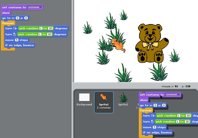 Пример программы на Скретче (запущен на Apple Inc.'s Mac OS X)